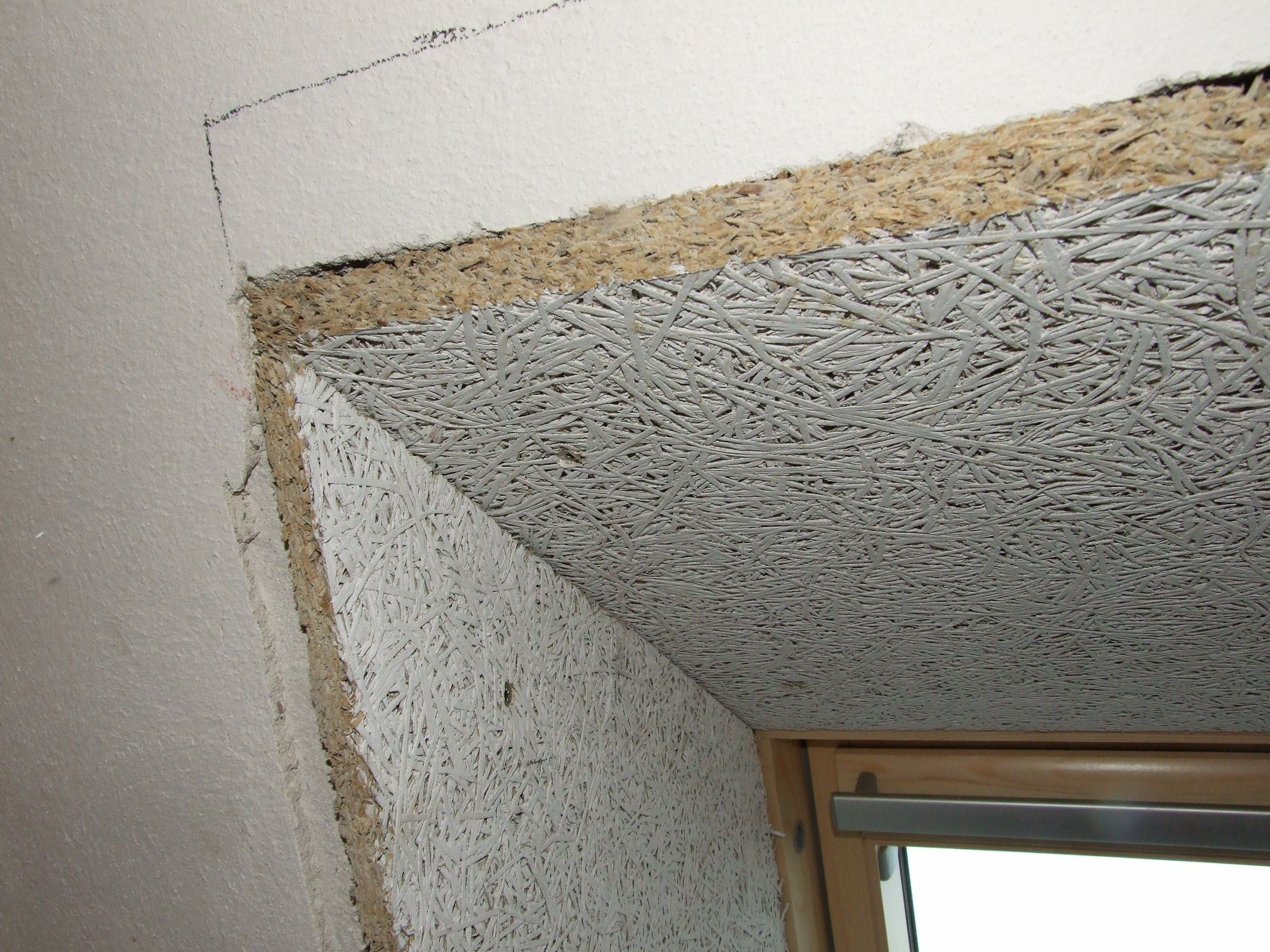 Holzwolle-Leichtbauplatte als Laibung eines Dachflächenfensters